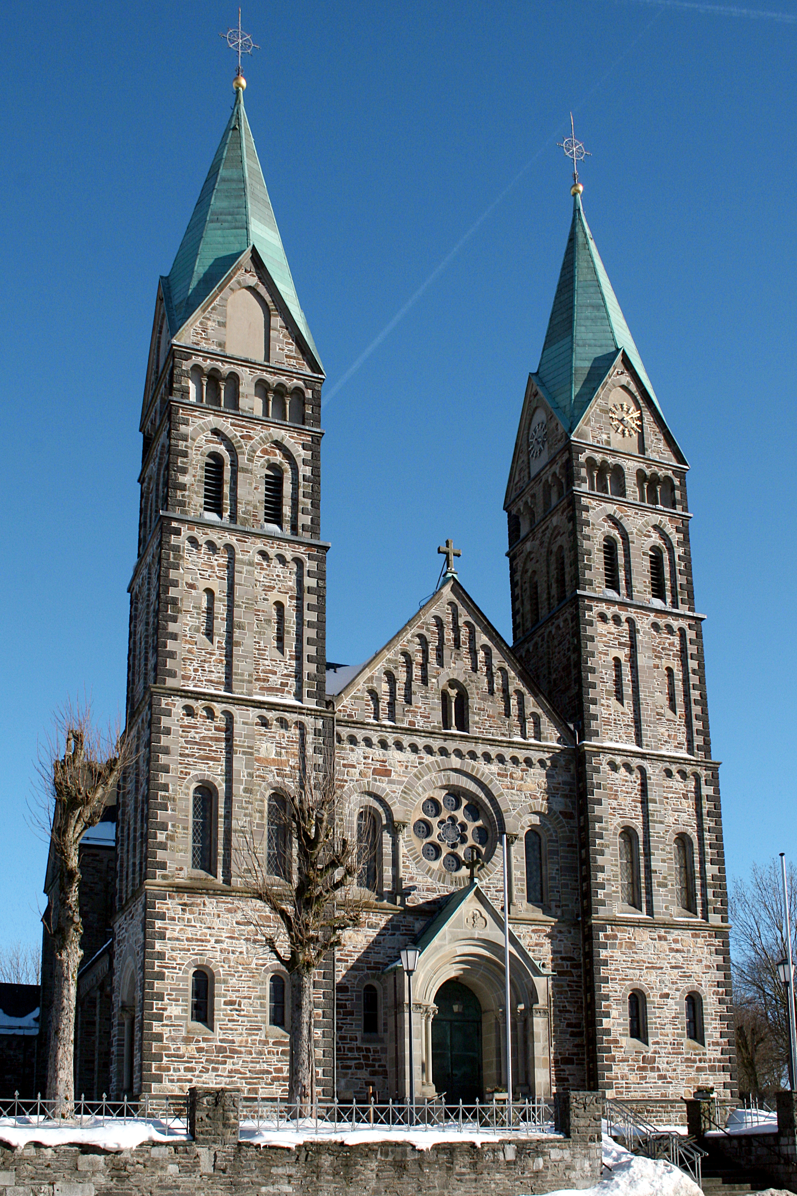 Kalterherberg (Monschau), St. LambertusThis is a photograph of an architectural monument., no. 379